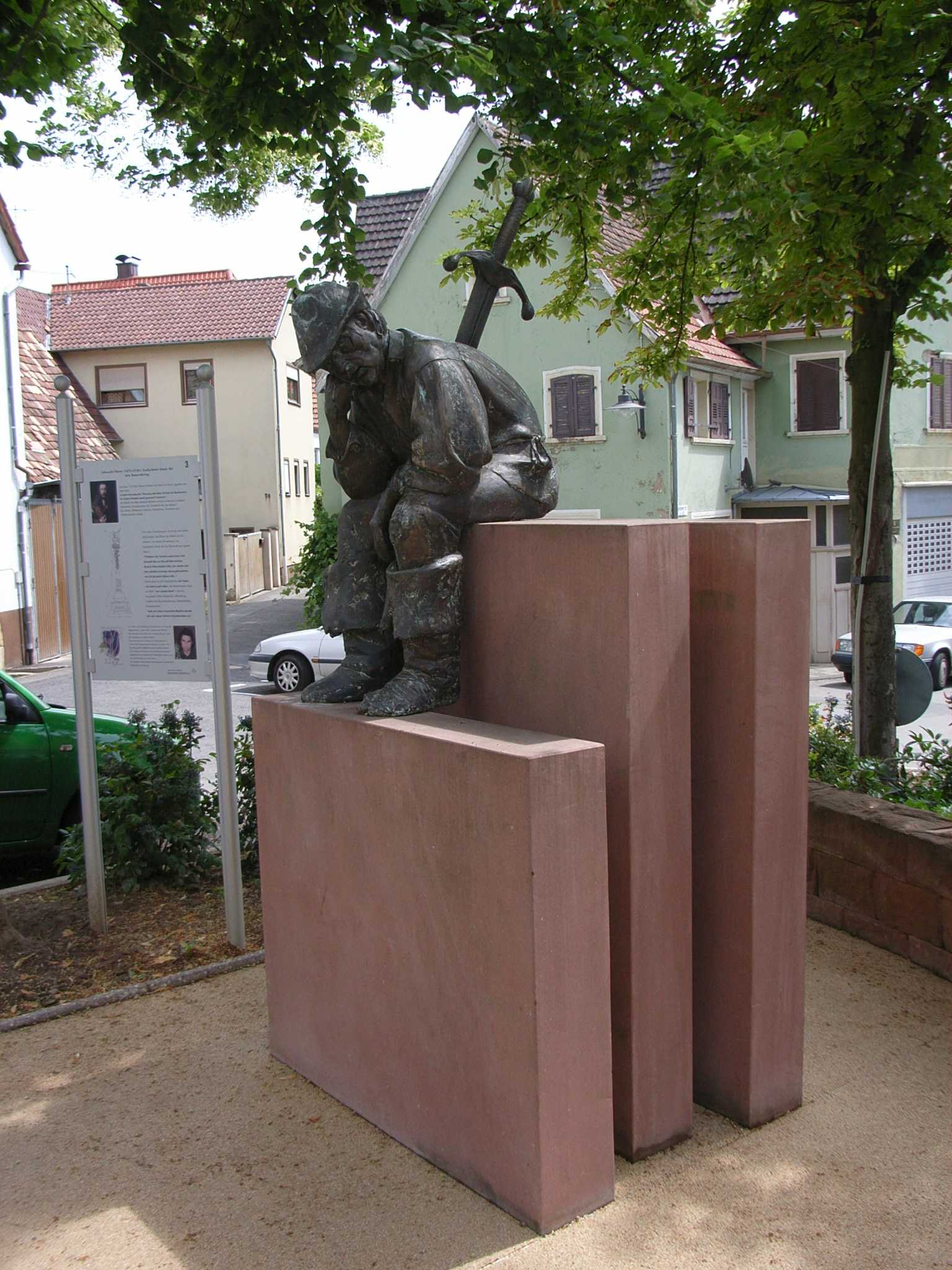 Bronzeplastik "trauretten Bauern" von Peter Brauchle zum Gedenken an den Pfälzer Bauernkrieg 1525, Nußdorf (Landau) 2002. Das Motiv zitiert eine Entwurfszeichnung von Albrecht Dürer (Gedächtnissäule für den Bauernkrieg)